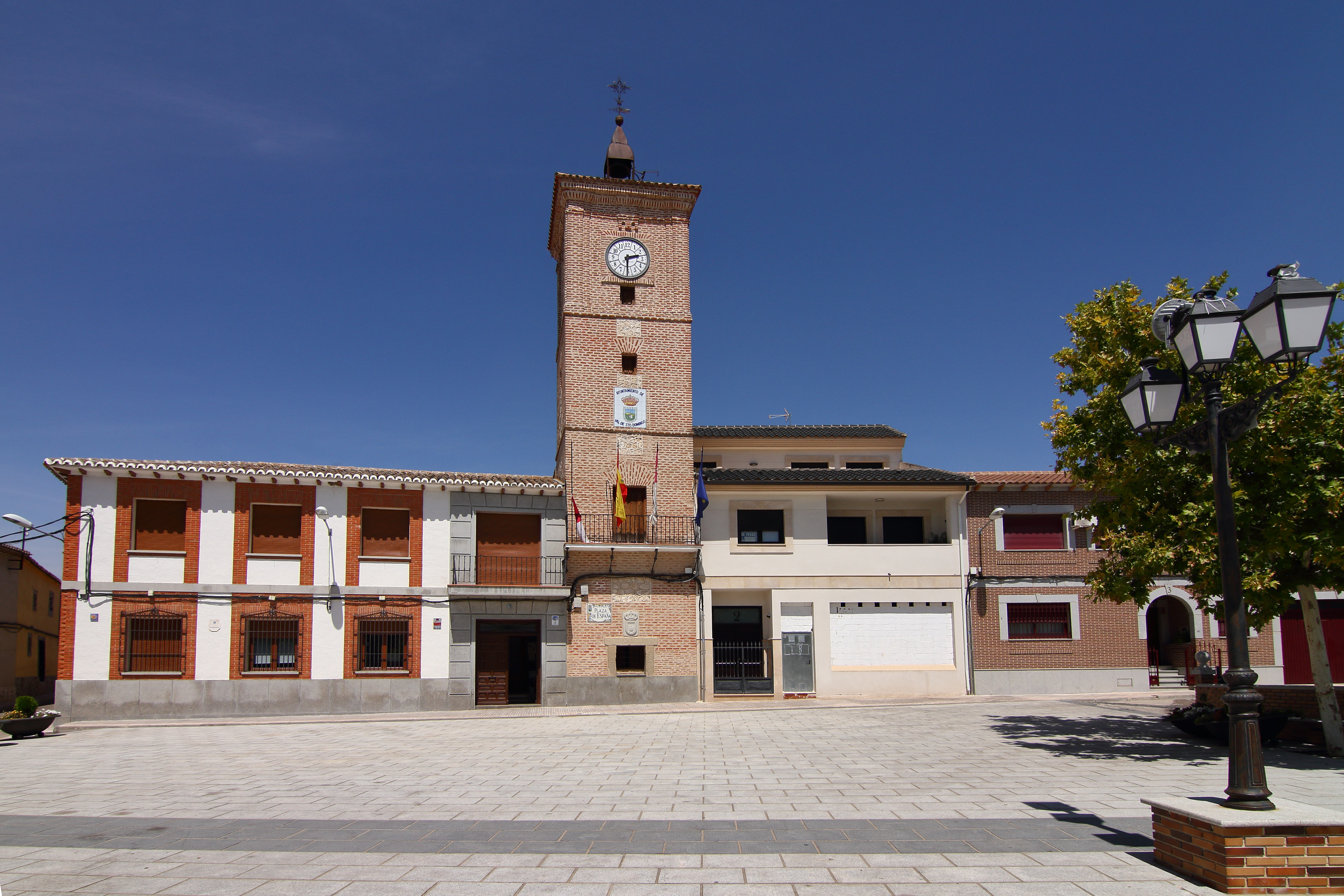 Santo Domingo-Caudilla, Ayuntamiento